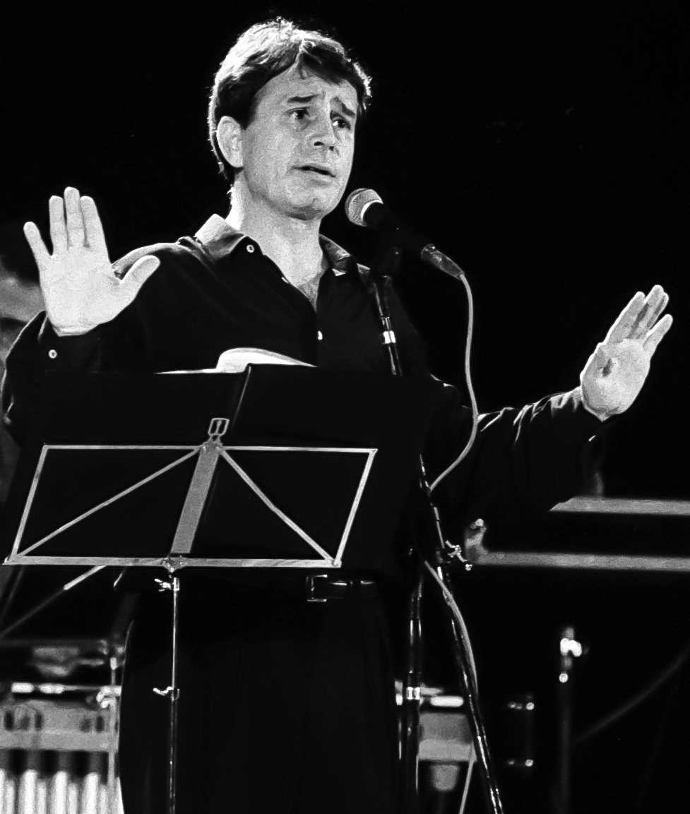 Actuación en Alcoi de Ovidi Montllor